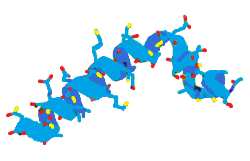 Representación gráfica de la estructura tridimensional de la Timalfasina